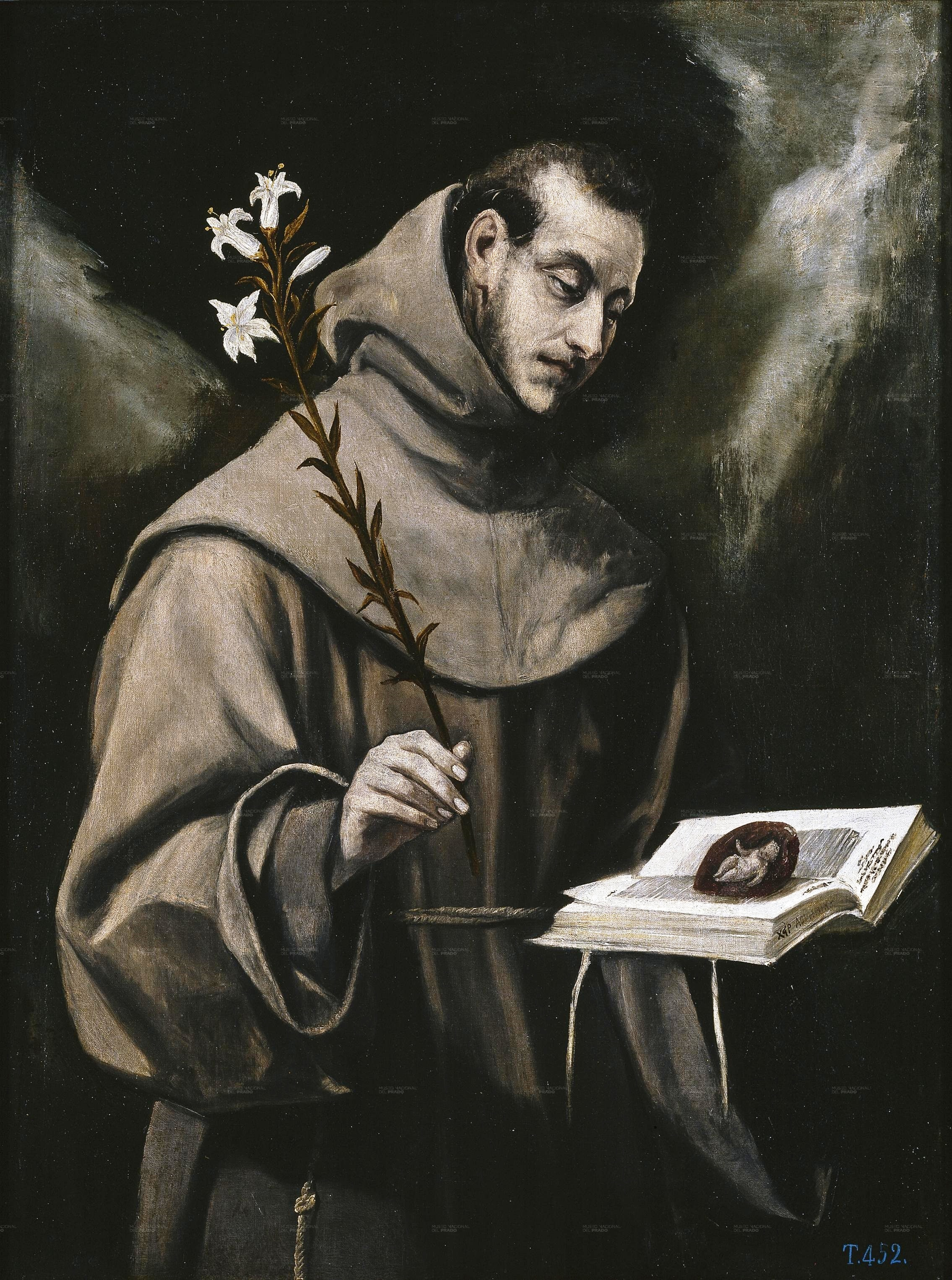 La obra representa a San Antonio de Padua.